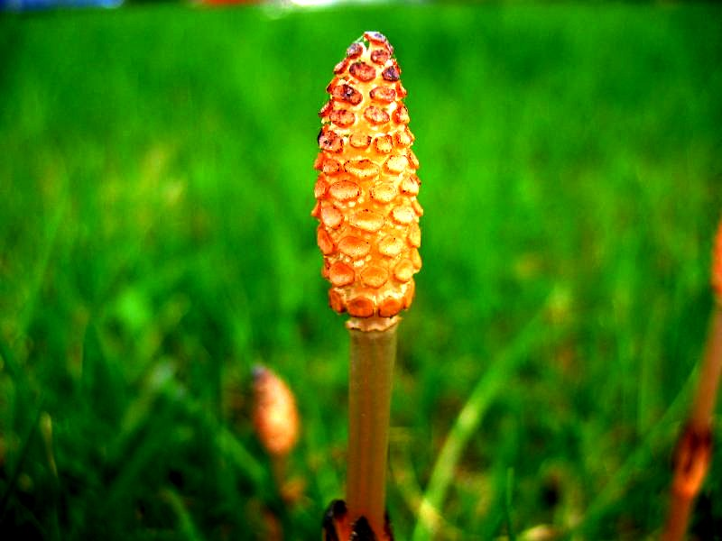 Sporangium des Acker-Schachtelhalms Equisetum arvense, Rostock